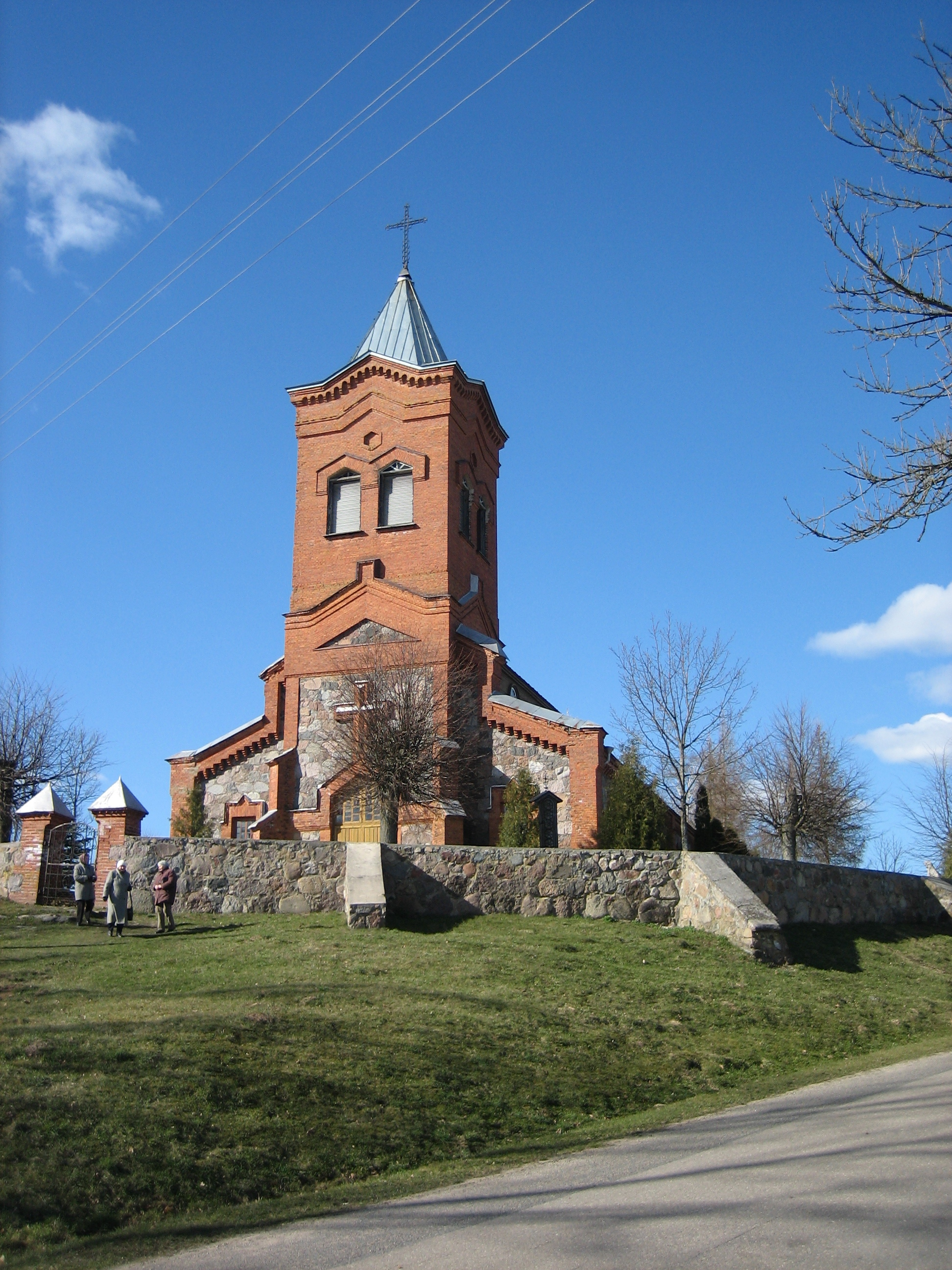 Linkmenų bažnyčia